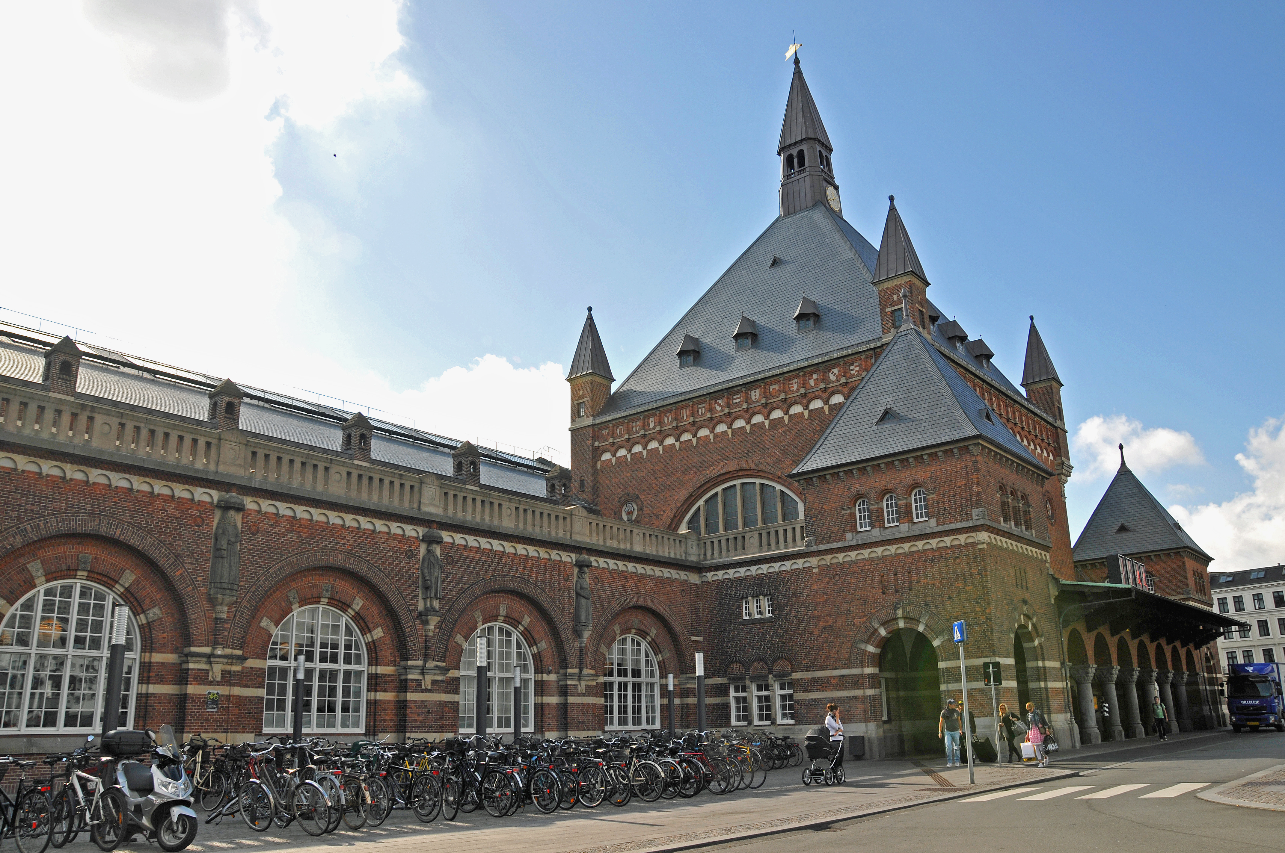 Copenhagen Central Station in Copenhagen, Denmark